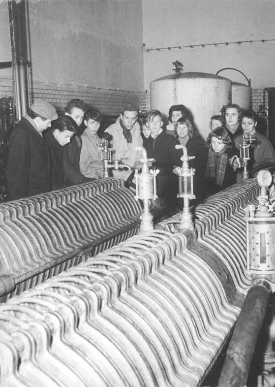 Berlin, Jugendstunde in einer Brauerei Zentralbild Zimontkowski Zimt-Noa 29.1.1958 Teilnehmer an der Jugendweihe besuchten VEB Schultheiss-Brauerei Etwa 30 Schüler der 1. Grundschule Berlin-Friedrichshain, die sich auf die Jugendweihe vorbereiten, besuchten am 29.1.1958 in einer Jugendstunde den VEB Berlin Schultheiss-Brauerei in der Leninallee. UBz: Die Jugendlichen im Filterraum, wo das Bier gefiltert wird.